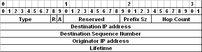 Message du protocole AODV